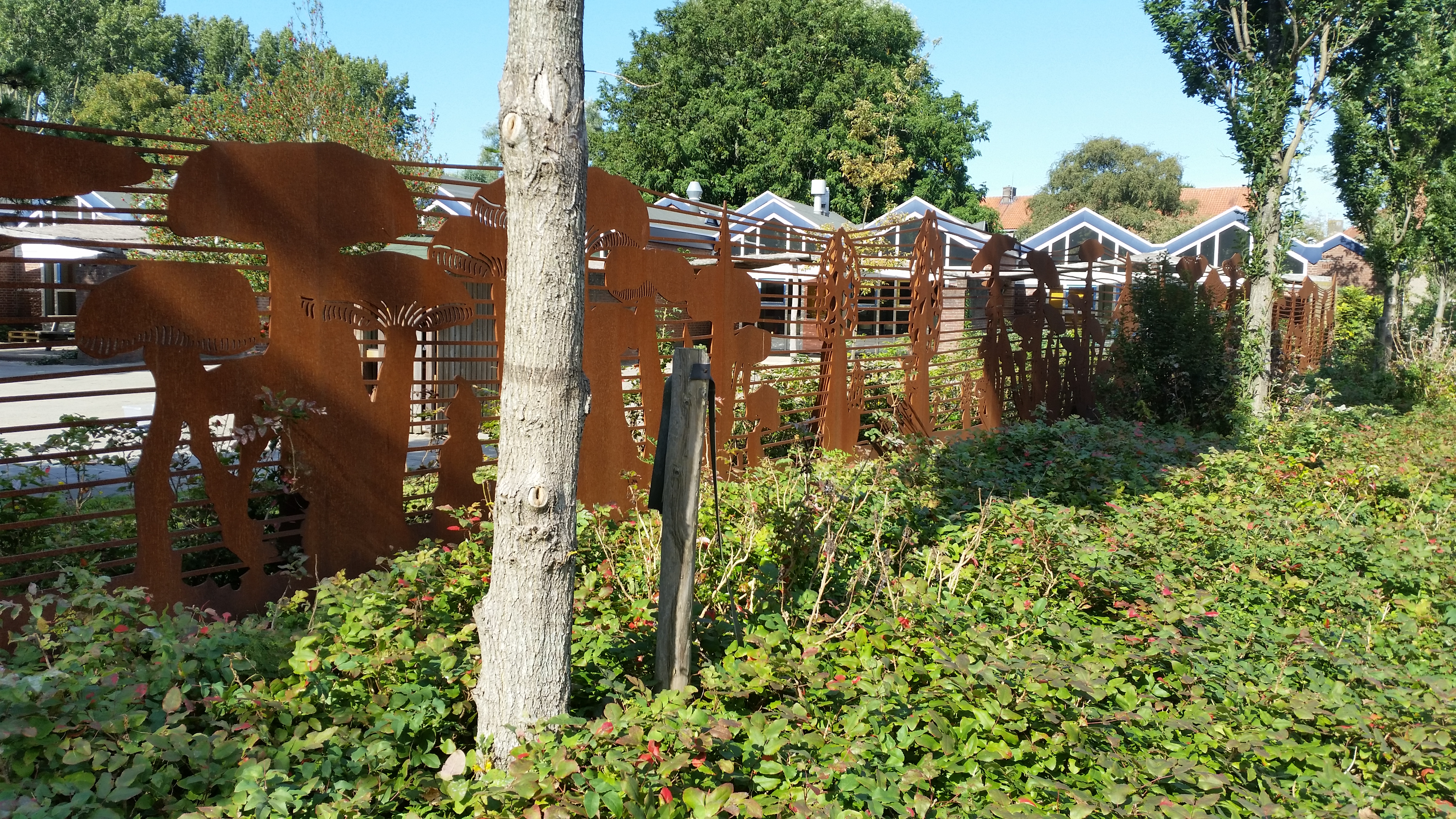 Kabouterhuis-hek